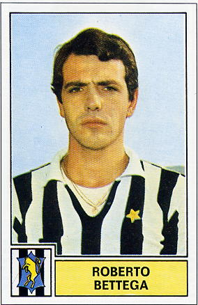 Roberto Bettega che indossa la maglia del Juventus